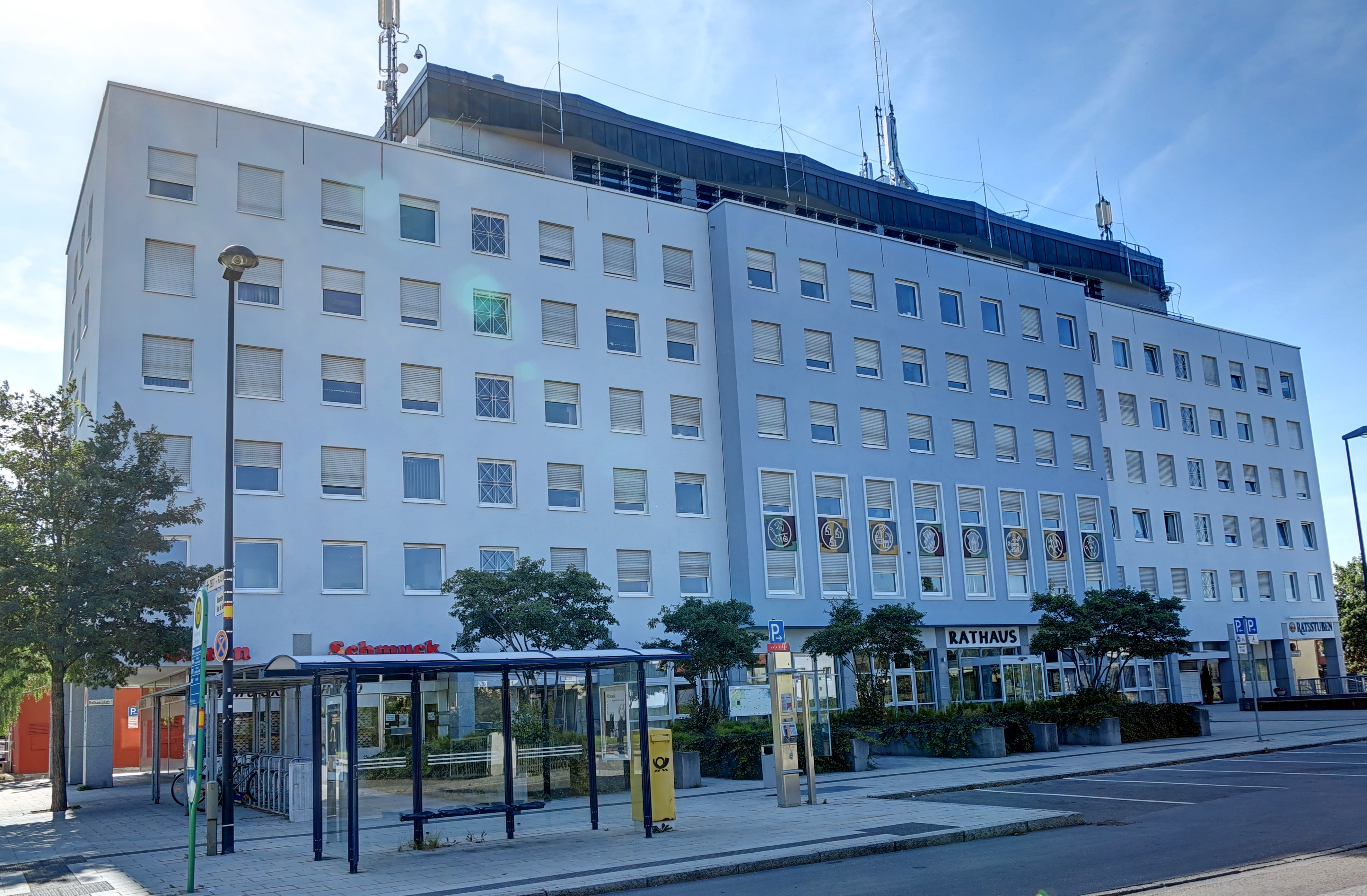 Deutschland, Bayern, Germering-Unterpfaffenhofen, Rathaus